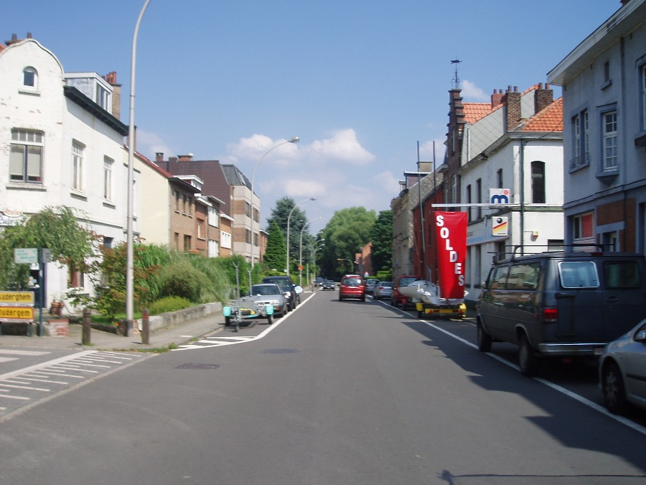 rue des Pêcheries Auderghem et Watermael-Boitsfort Belgium